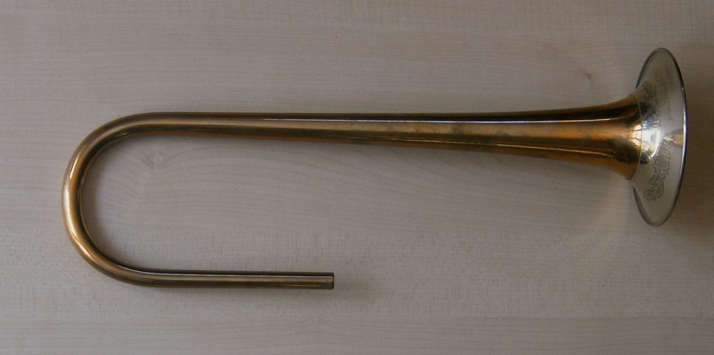 german trumpet-bell